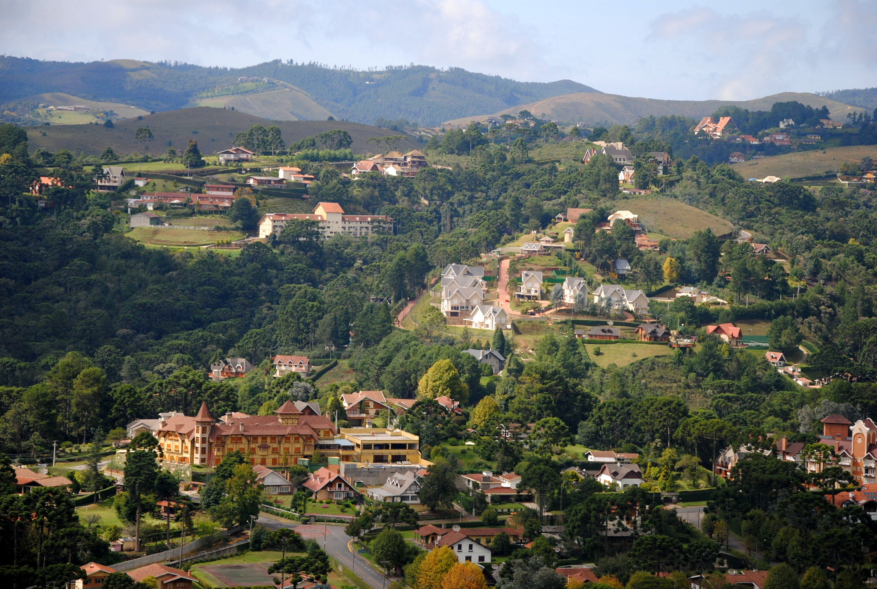 Vista do morro do elefante. Campos do Jordão (SP), Brazil.